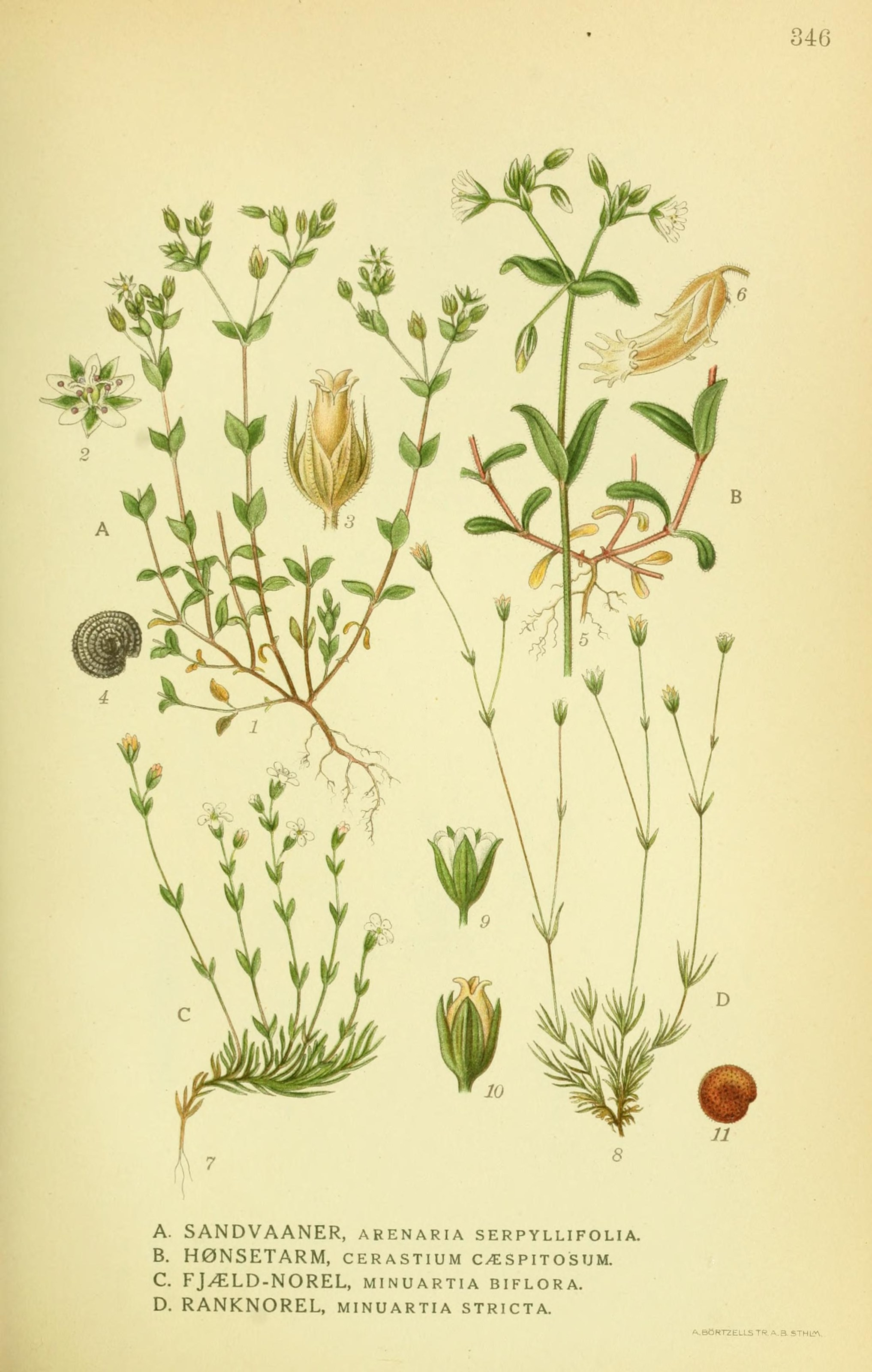 346 A. SANDVAANER, arenaria serpyllifolia. B. HØNSETARM, cerastium cæspitosum. C. FJÆLD-NOREL, minuartia biflora. D. RANKNOREL, minuartia stricta. A.B0RT2EUS TR. A. S. STH1»\